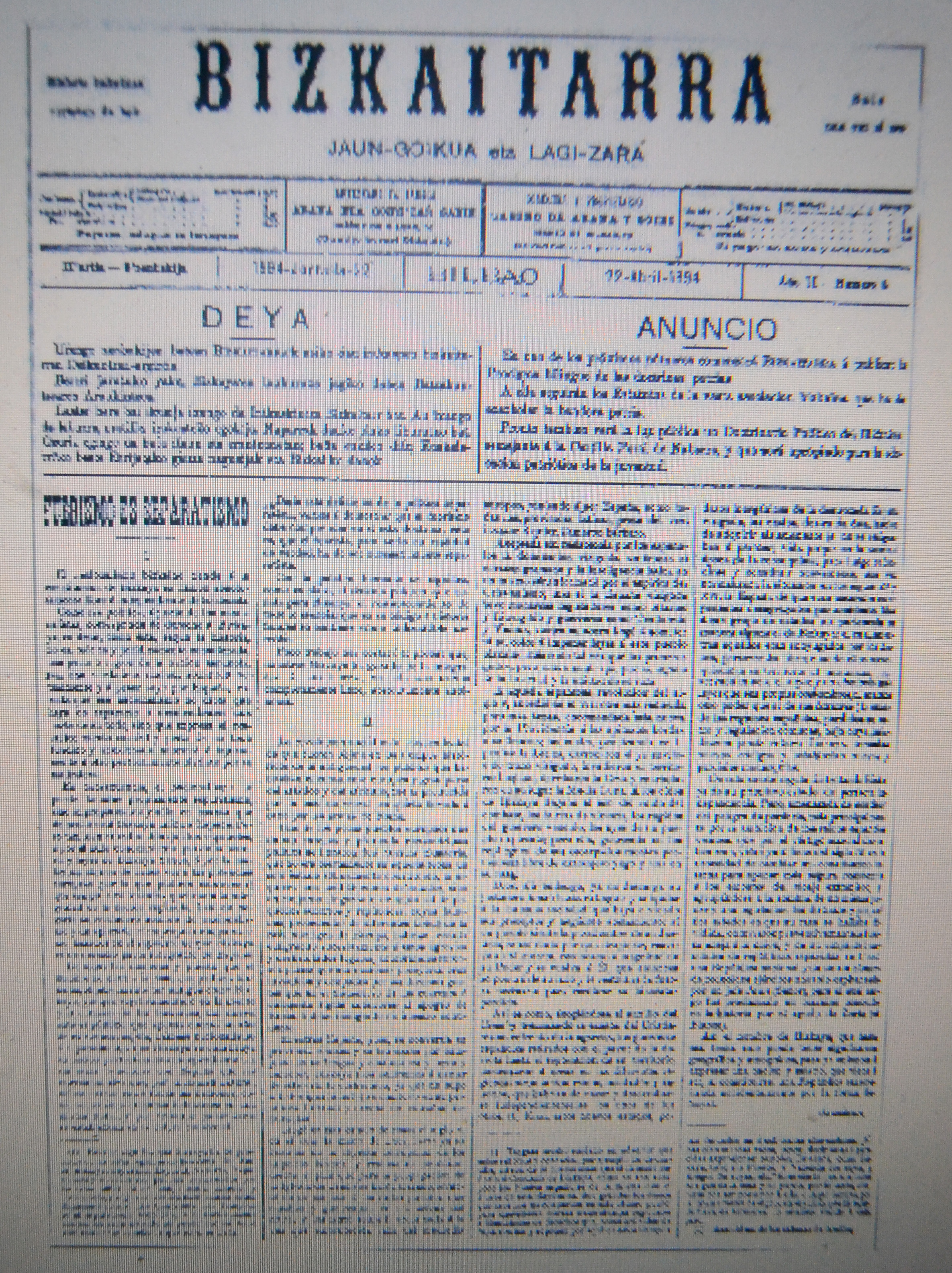 1894ko apirileko Bizkaitarra euskal aldizkari abertzalearen alea. - Bizkaitarra basque nationalism magazine. Number of April, 1894.